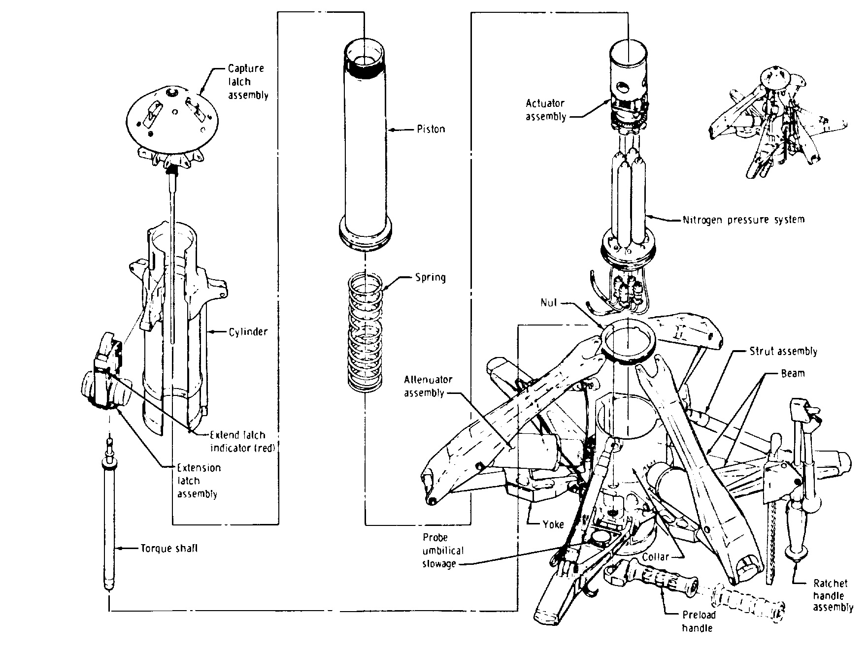 חלקי הגשש של מערכת העגינה בחללית אופולו